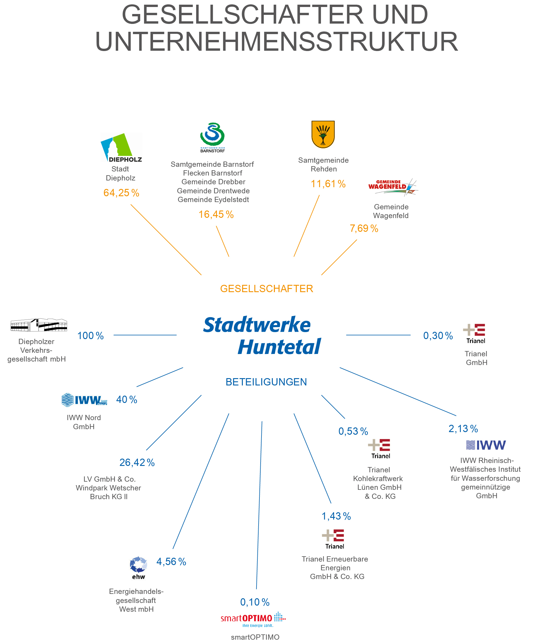 Gesellschafter und Unternehmensstruktur der Stadtwerke Huntetal, Stand 11/2019